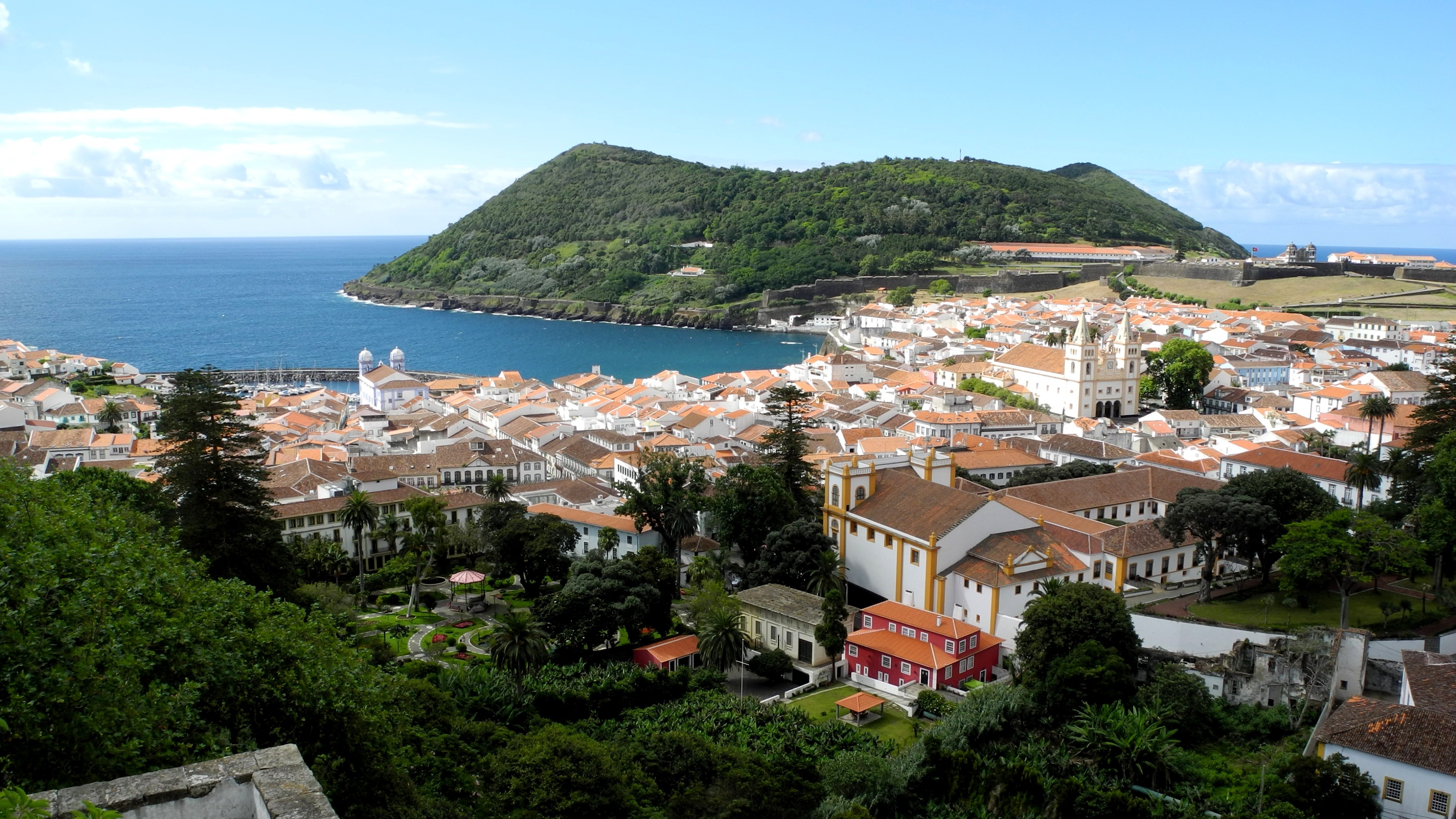 Angra do Heroísmo - Sicht vom Obelisken auf Stadt und Hafenbucht mit Monte Brasil